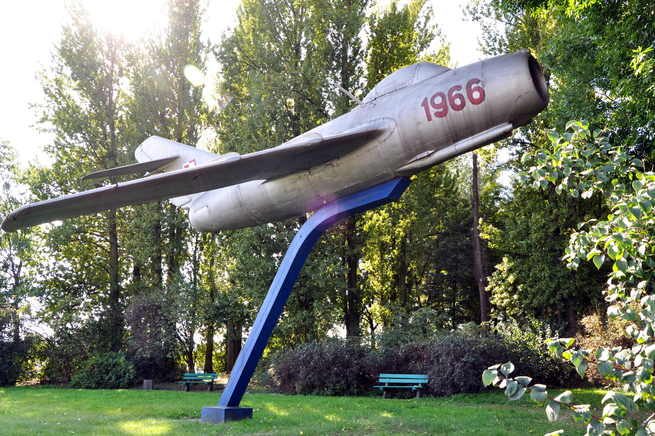 Ostrów Wlkp., skwer przy ul. Krotoszyńskiej. Na 1000 lecie polskiej państwowości Aeroklub Ostrowski ufundował mieszkańcom pomnik samolotu Lim-1, akcentując przy okazji 20 lecie swego istnienia. W trakcie odnawiania pomnika w 2017 roku okazało się że jest to wyprodukowany w 1949 roku w Związku Radzieckim MIG-15 nr 0234. Jest jednym z pięciu pierwszych tego typu samolotów, które trafiły do Polski 19 lipca 1951 roku.